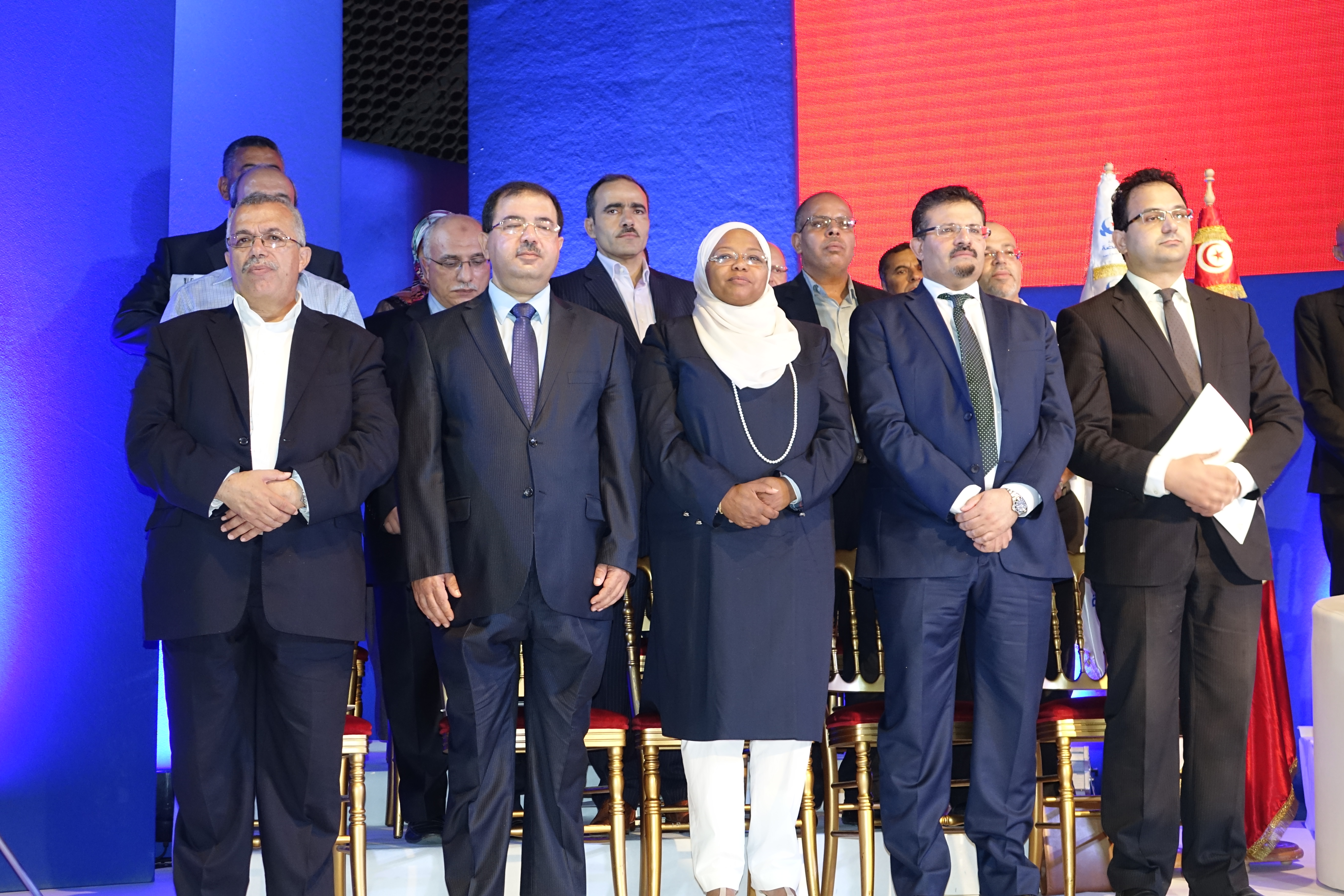 صور ندوة حركة النهضة للإعلان عن برنامجها الاقتصادي والاجتماعي أثناء ندوة حركة النهضة التونسية للإعلان عن برنامجها الاقتصادي والاجتماعي للانتخابات التشريعية التونسية 2014 في 23 سبتمبر 2014. Pendant la réunion du mouvement Ennahdha en Tunisie pour annoncer son programme économique et sociale pour les élections législatives tunisiennes en 2014, le 23 Septembre 2014.